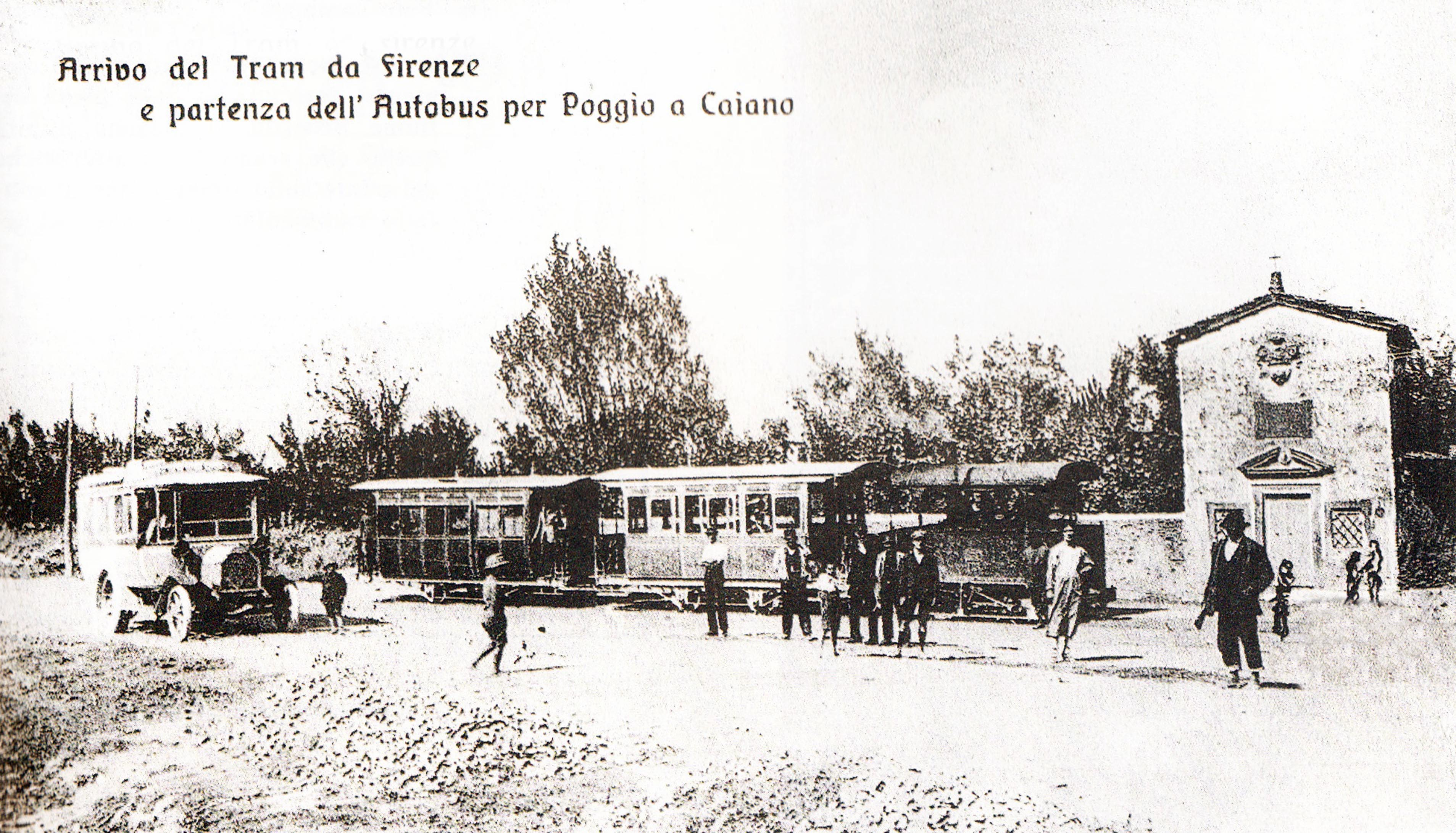 cartolina raffigurante il capolinea della travia per Poggio a Caiano in località Cappella Bargiacchi a Brozzi. Dal 1921 per proseguire alla volta del Poggio era necessario usare l'autobus